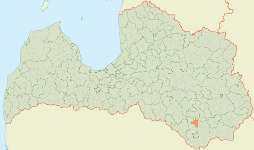 Расположение Калупской волости на карте Латвии